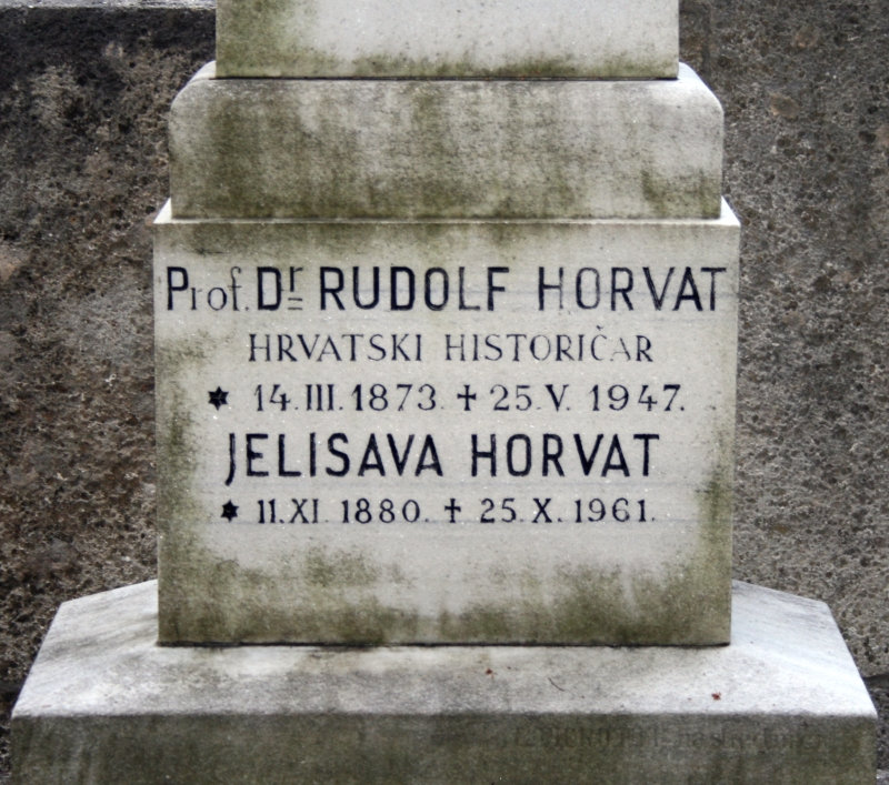 grob Rudolfa Horvata na Mirogoju u Zagrebu